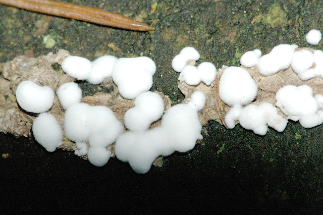 Picture taken in Commanster, Belgian High Ardennes .